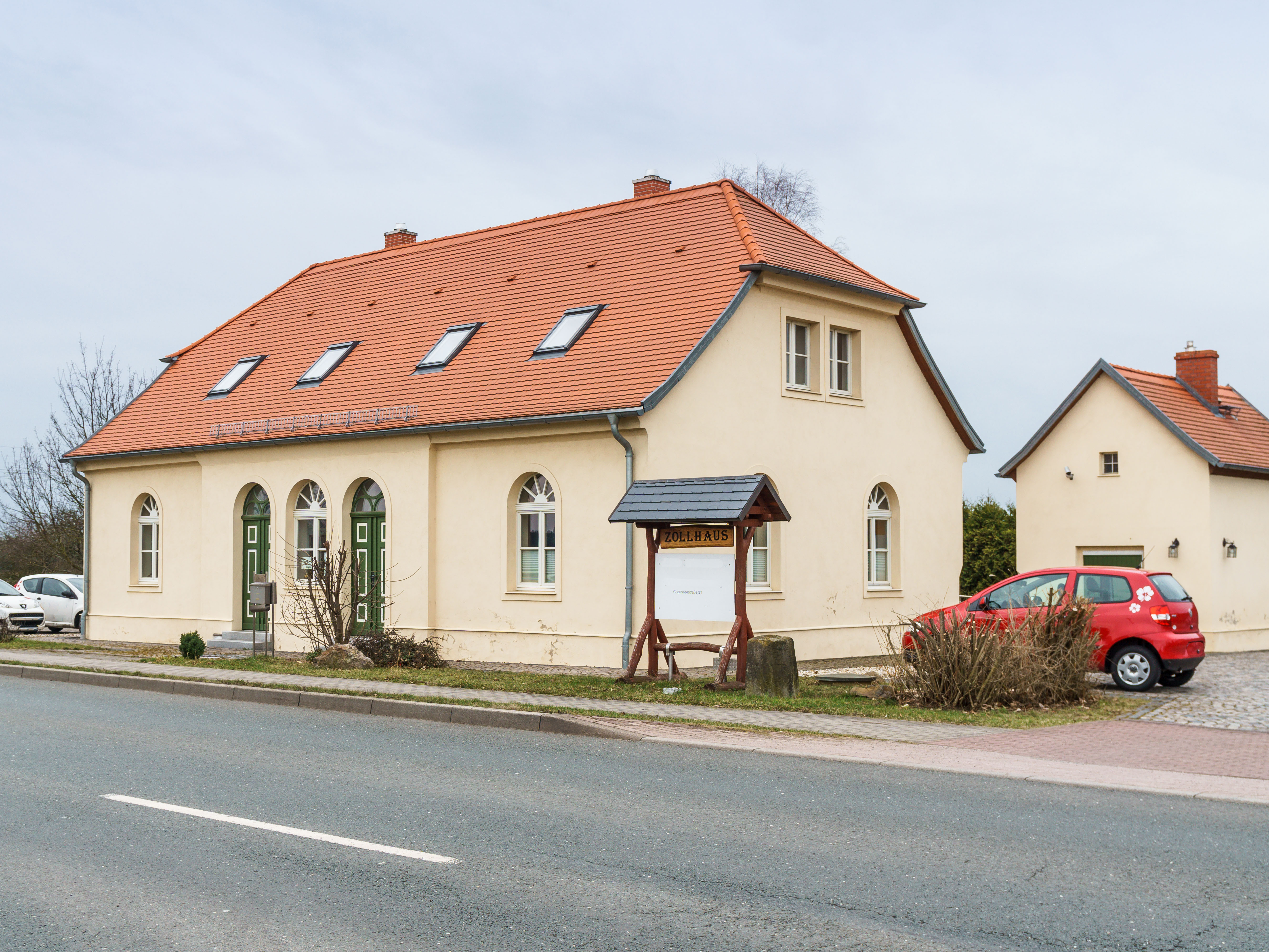 Preußisches Chausseehaus, Chausseestraße 31 an der B 100 in Muldestausee OT Gossa. Davor rechts ein Preußischer Meilenstein (2128, Sechskantstein / Myriameterstein). This is a picture of the Baudenkmal (cultural heritage monument) according to the Cultural Heritage Protection Law of Saxony-Anhalt with the ID 094 96396